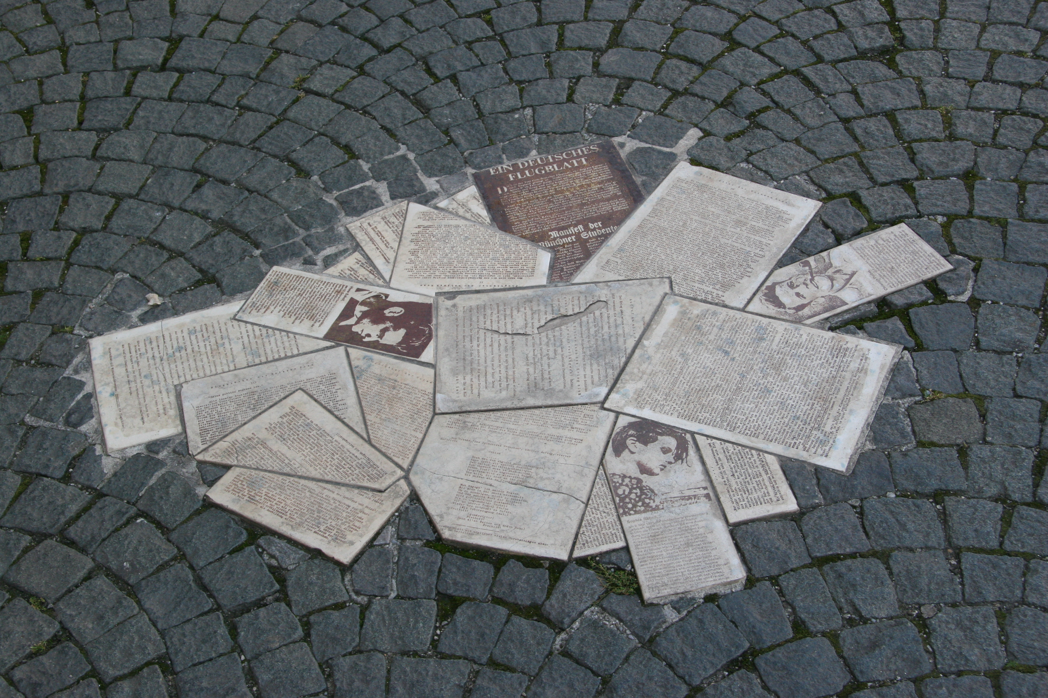 Mahnmal für die „Weiße Rose“ auf dem Geschwister-Scholl-Platz. Es zeigt eine steinerne Nachbildung der Flugblätter.